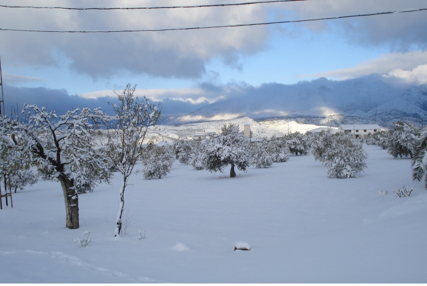 Foto de la localidad de Almontaras, en el municipio de Castril (Granada, España)